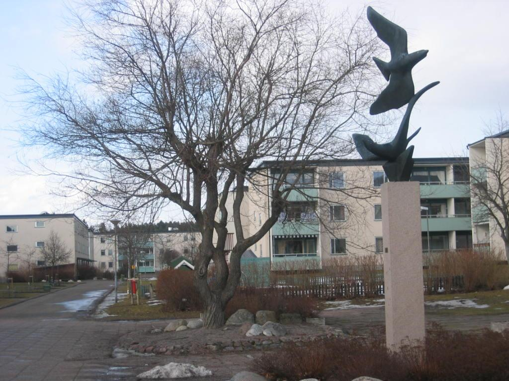 Sörgårdens torg i Vallentuna. Till höger skulpturen Fåglarna av Axel Wallenberg. Foto: Einarspetz